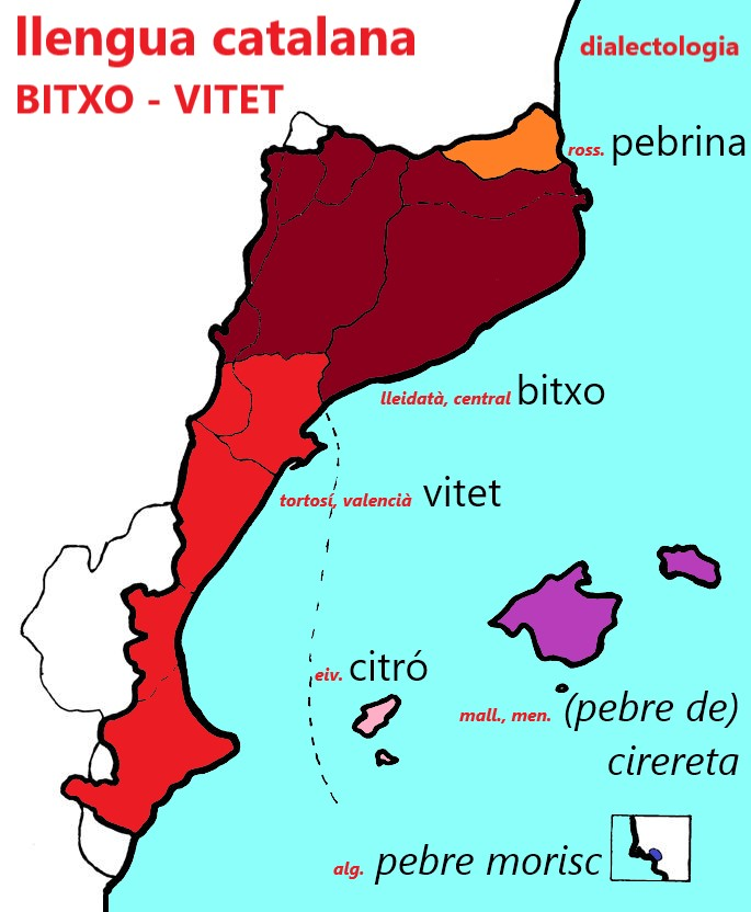 Mapa dialectal del mot bitxo.